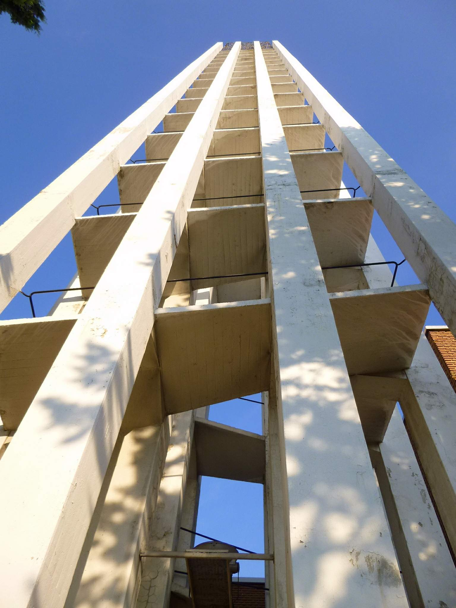 Iglesia de San Pedro Mártir (Dominicos), en Madrid